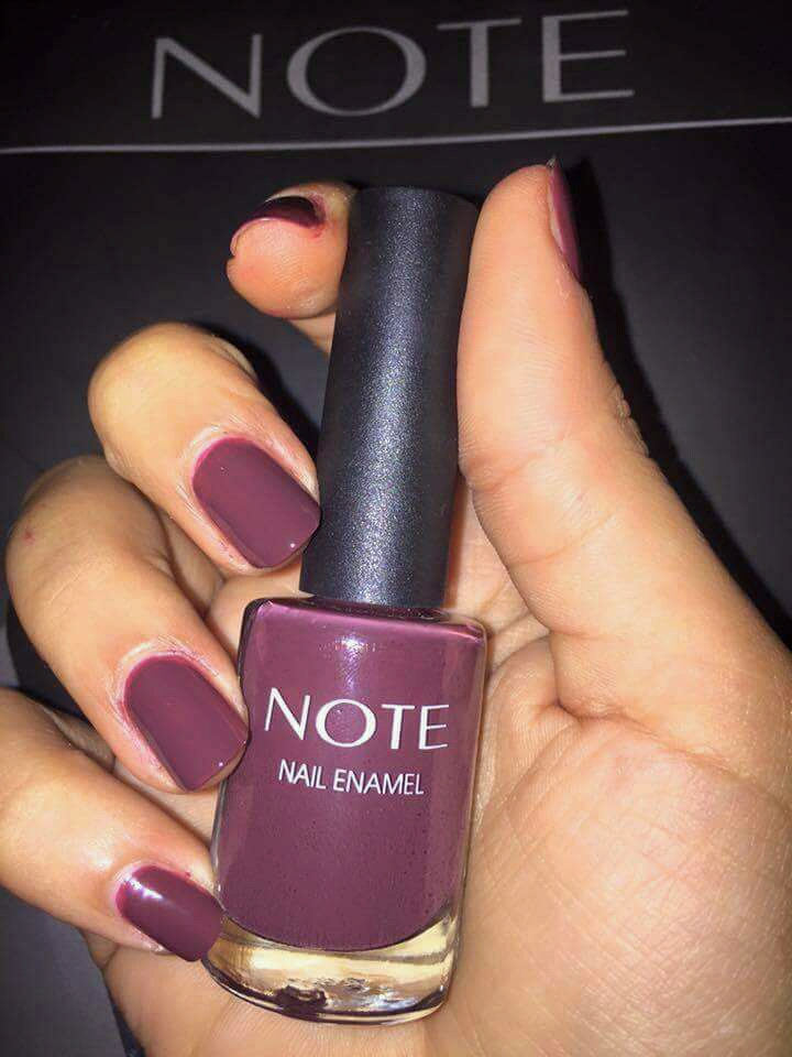 vernis NOTE